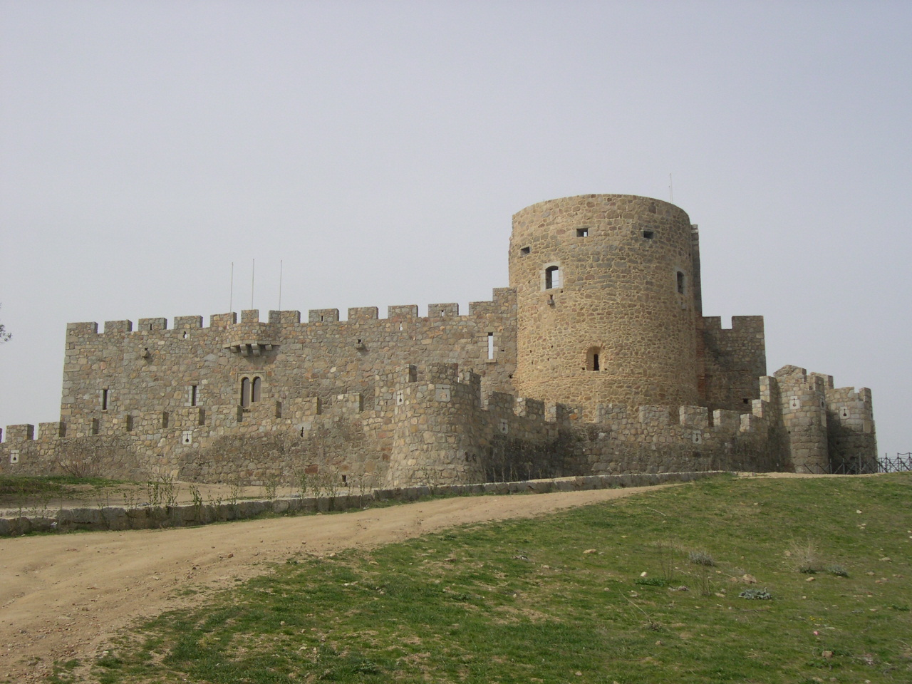 Castillo de Don Álvaro de Luna. La Adrada, provincia de Avila, Castilla y León, España